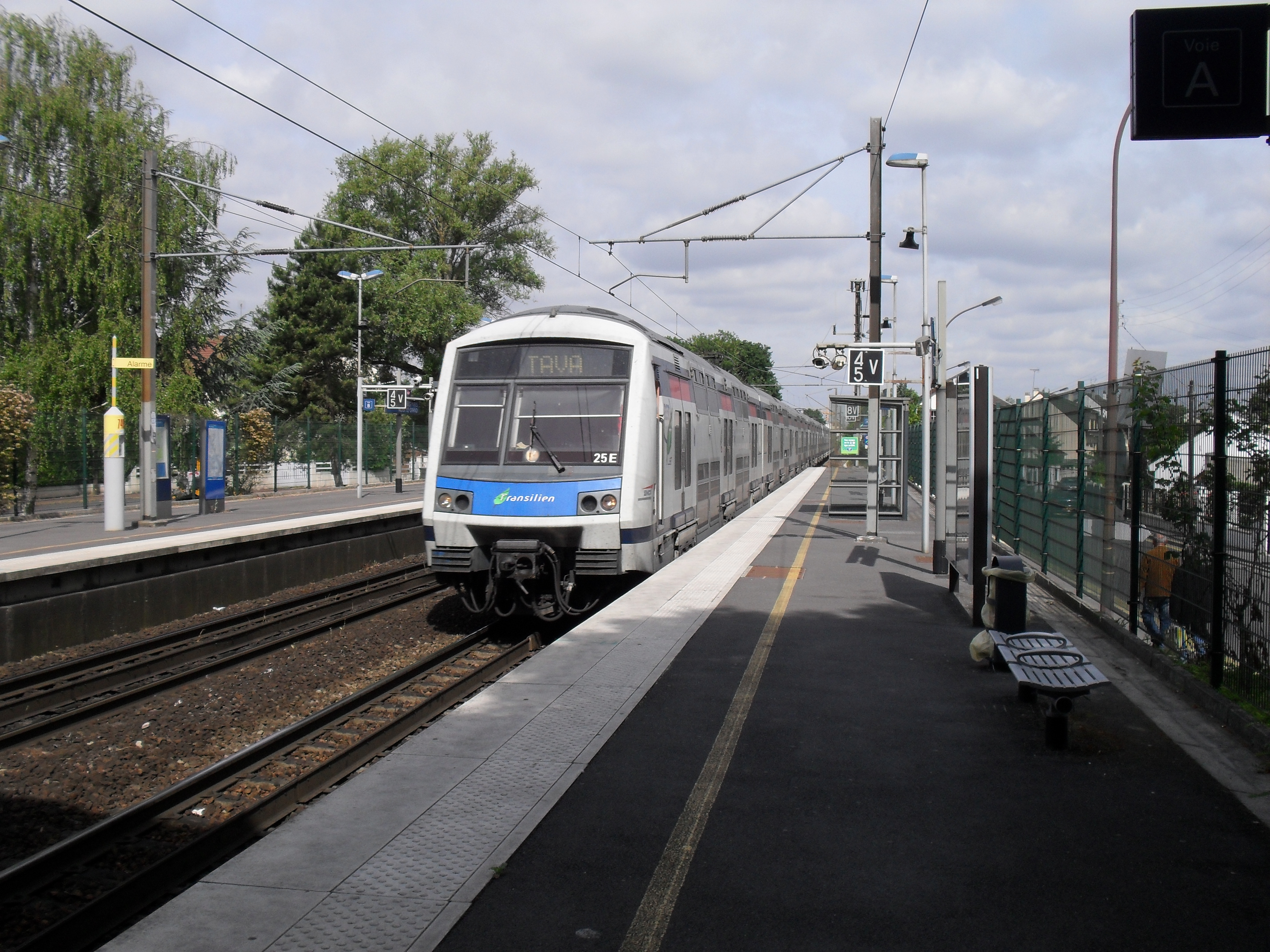 RER E - Gare des Yvris - Noisy-le-Grand